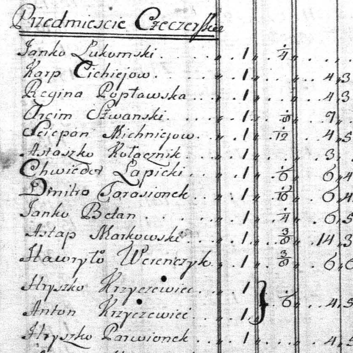 Чачэрскае прадмесце. Гістарычны раён Гомеля. Інвентар 1771 год